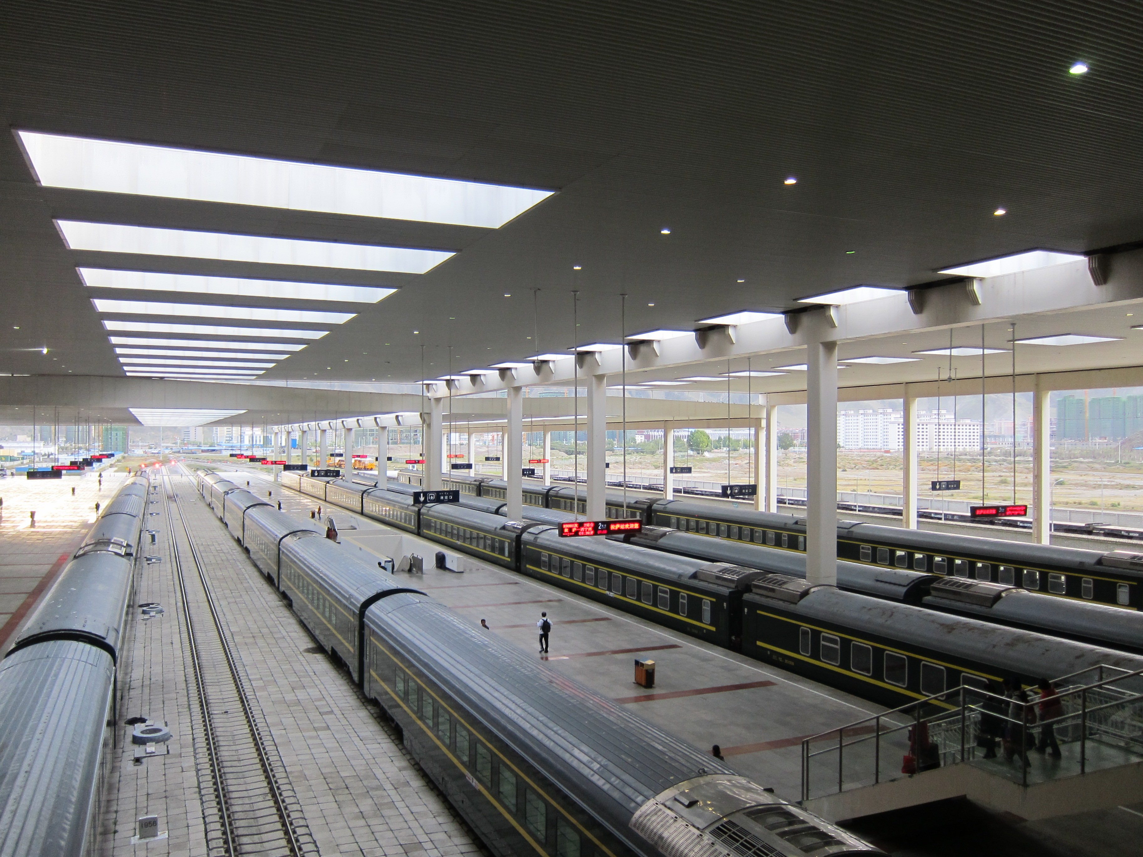 Tibet D04 - Lhasa